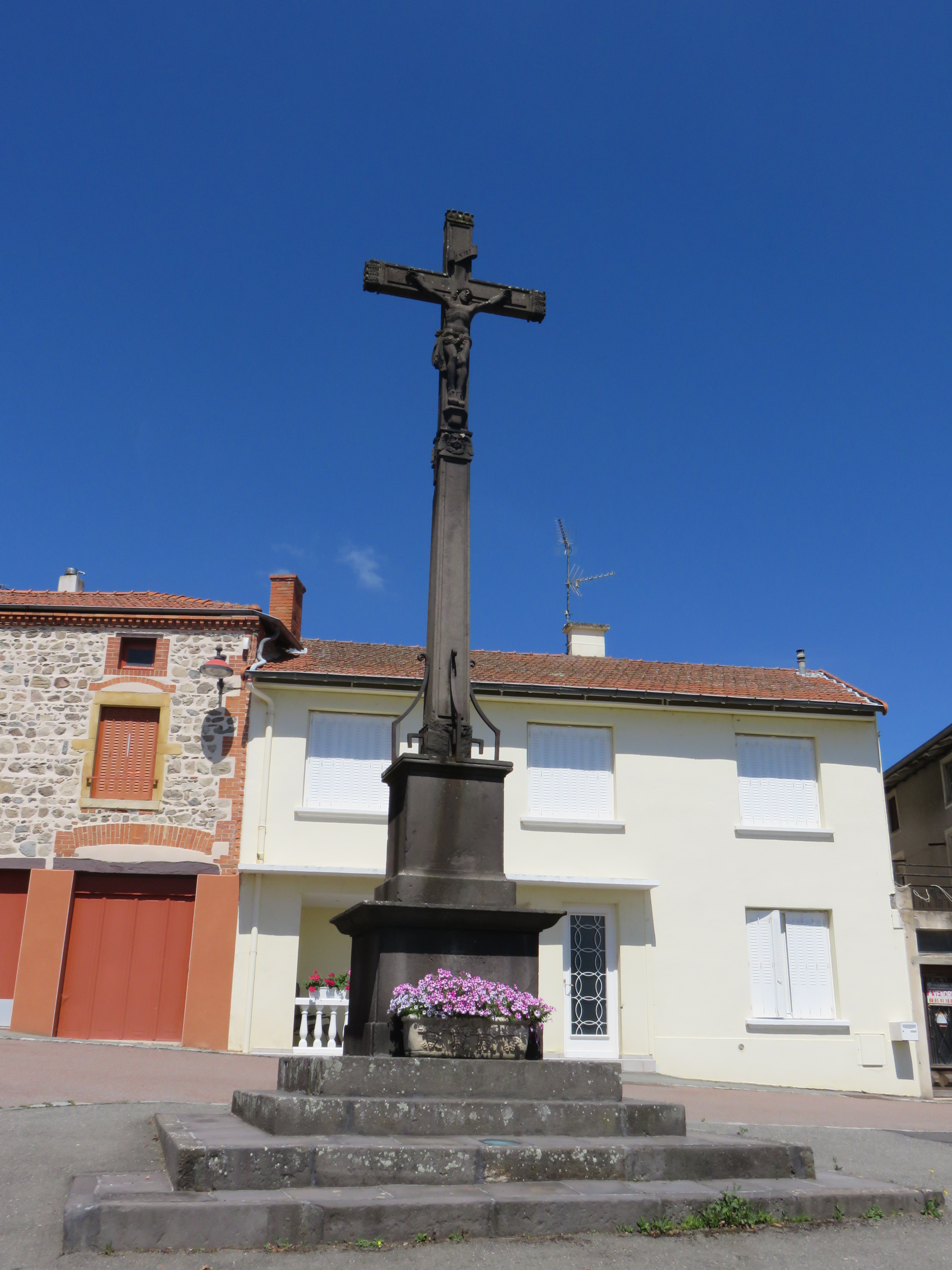 Croix dans le centre du village de Villemontais (Loire, France).